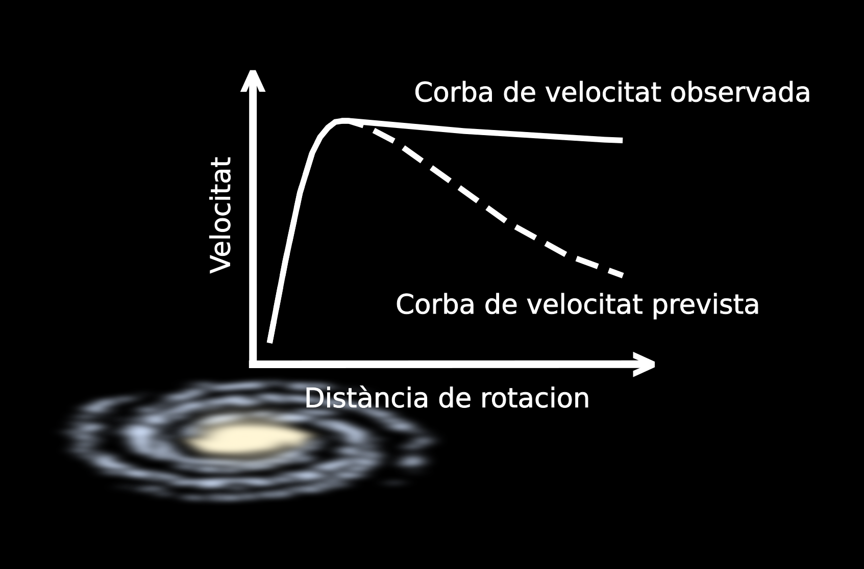 Reparticion dei velocitats de rotacion deis estèlas dins una galaxia espirala.